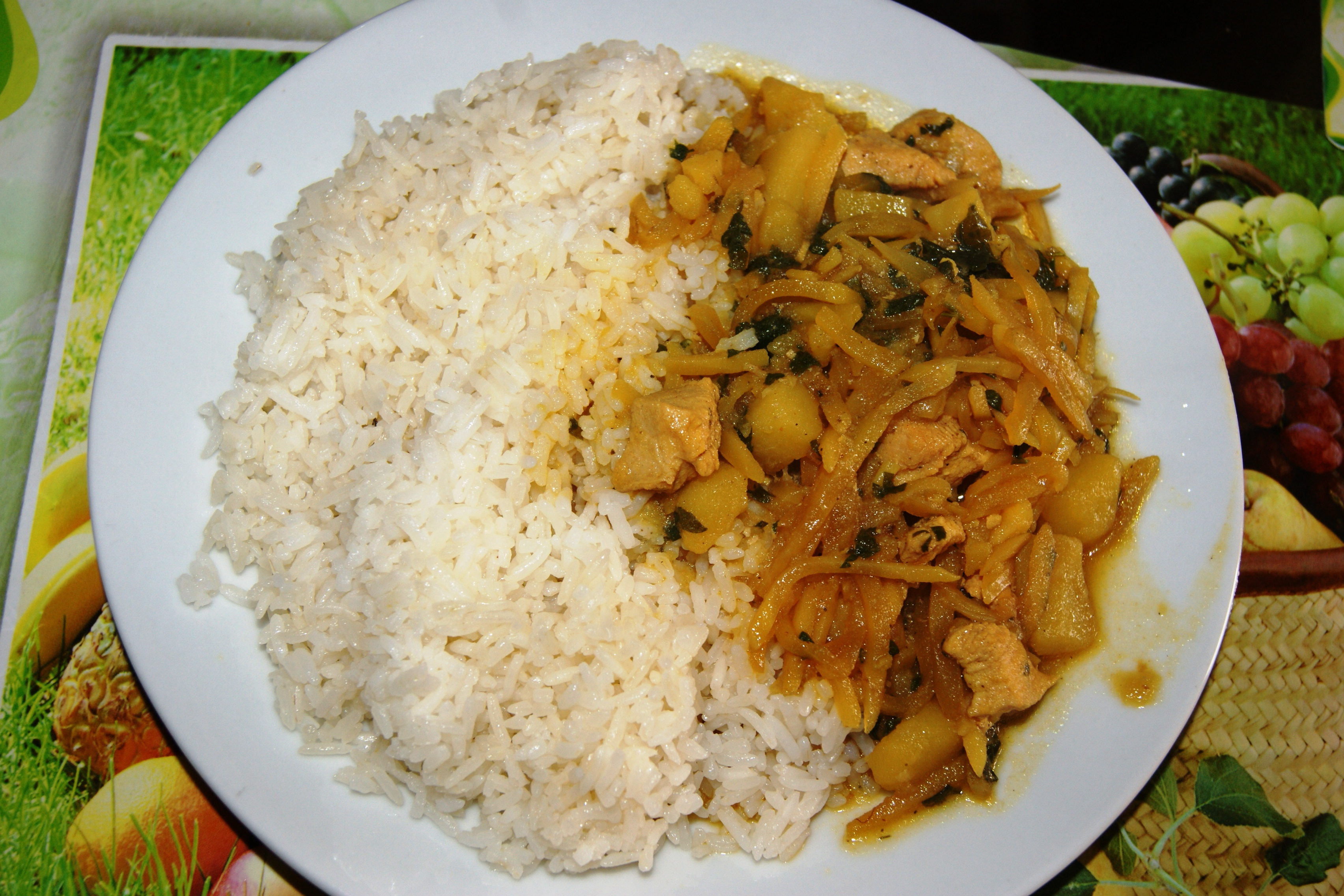 Olluquito con pollo y arroz blanco. Preparación casera. Lima - Perú.